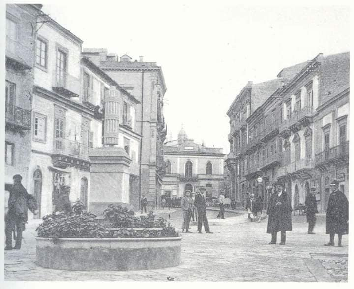 Cartolina d'epoca dell'Ex orfanotrofio Moncada poi corte d'Appello di CL, senza il II piano con Monumento a G. Gattuso nel 1921